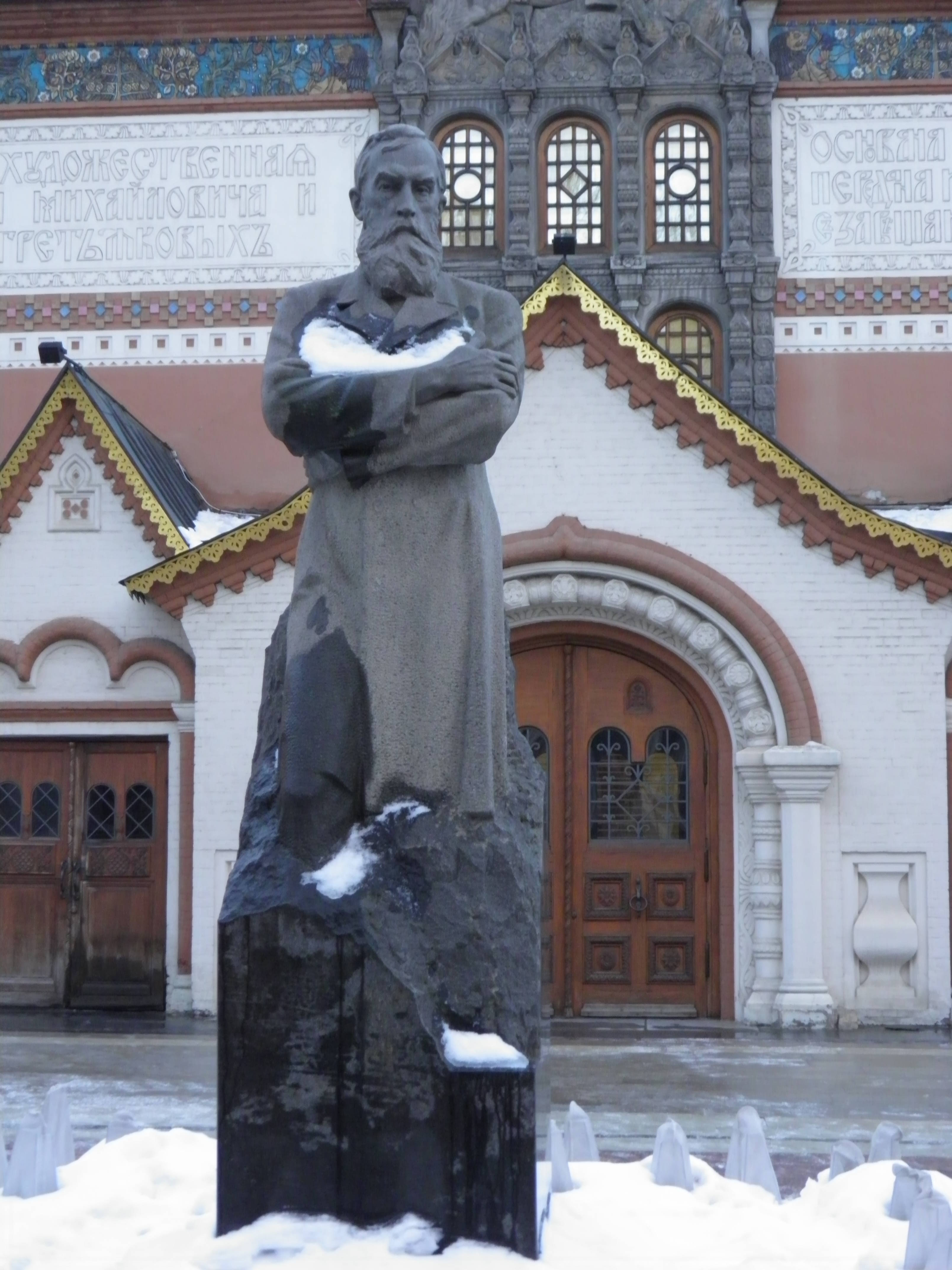 Galerie Tretiakov à Moscou (Russie).